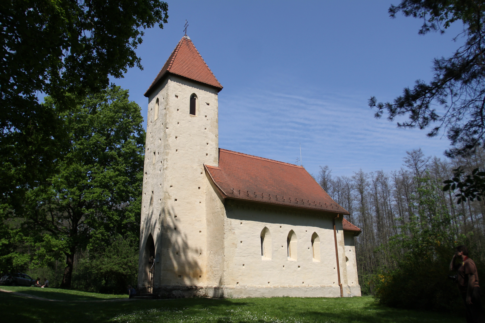 Szentháromság és Szent István király római katolikus templom (Velemér, Paprét)